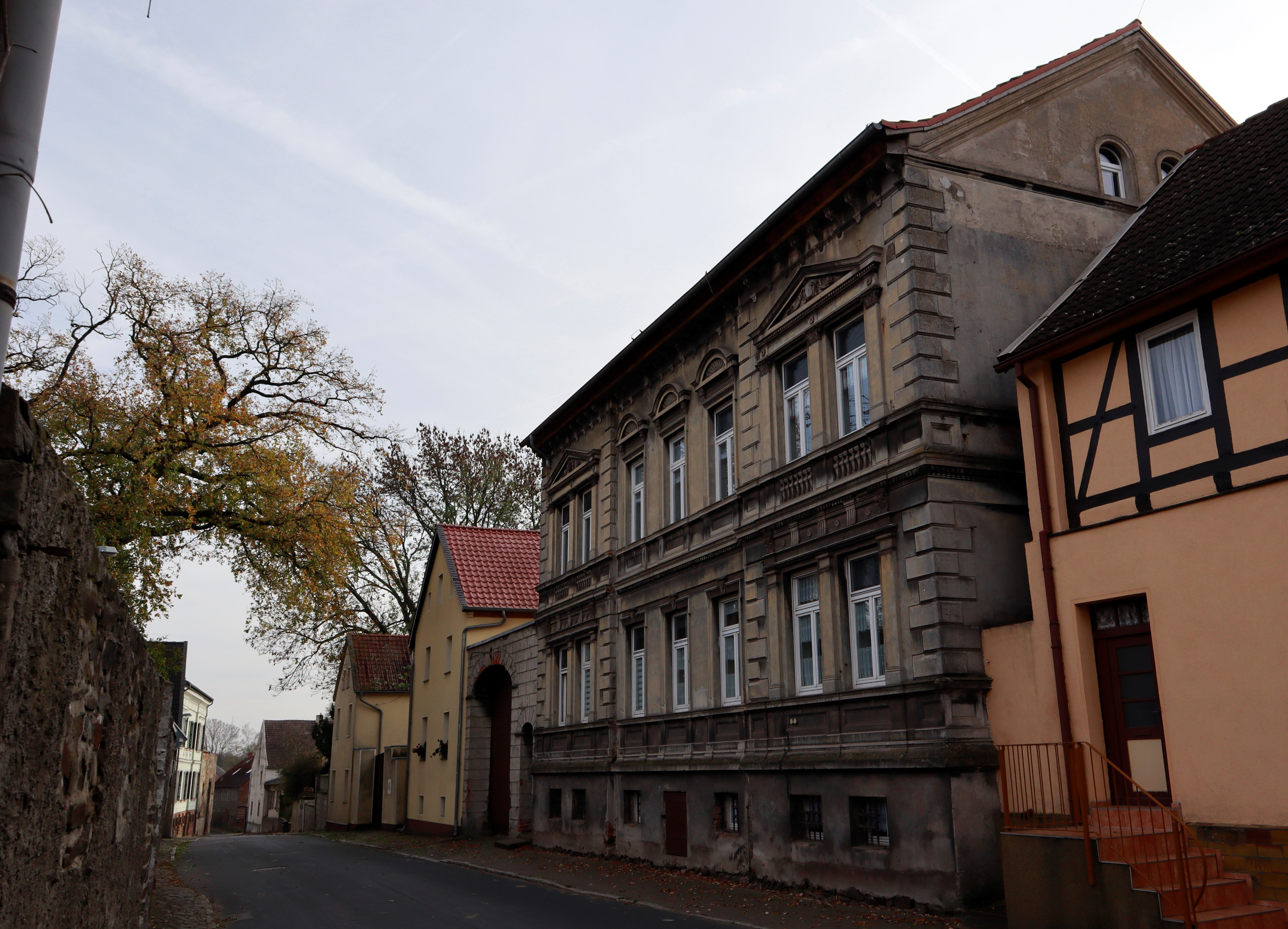 Hundisburg, Hofanlage, Hauptstr. 7